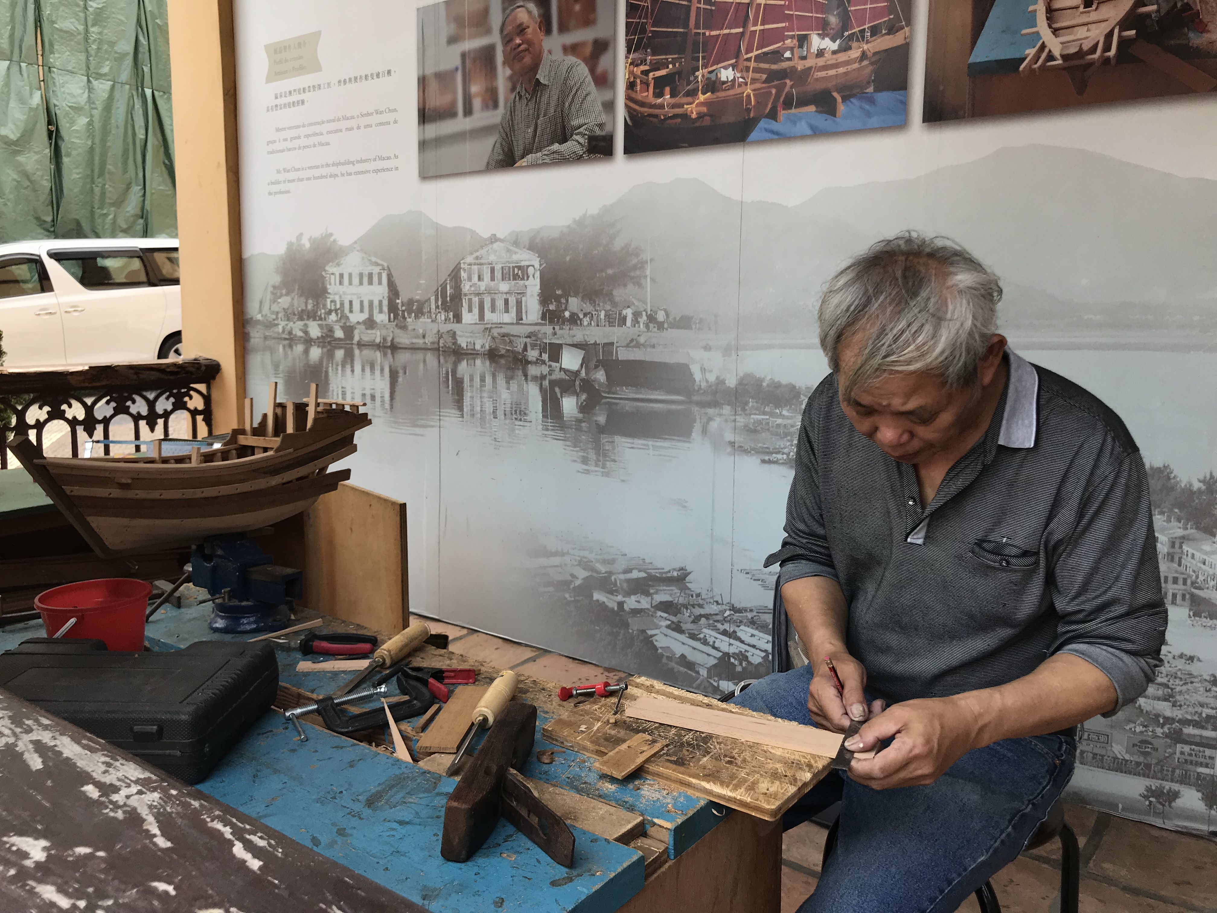 中文（台灣）: 在澳門歷史檔案館外製作船模的溫泉